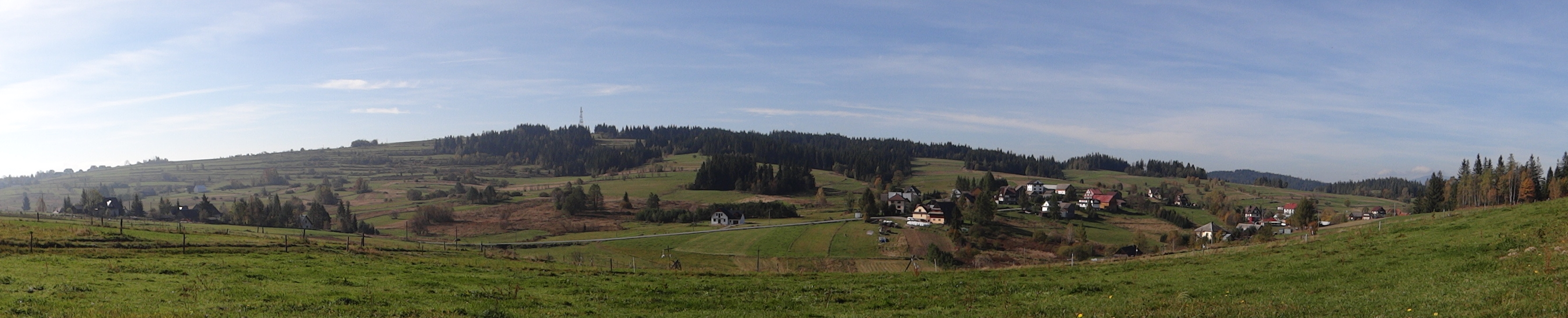 Bukowiński Wierch, panorama